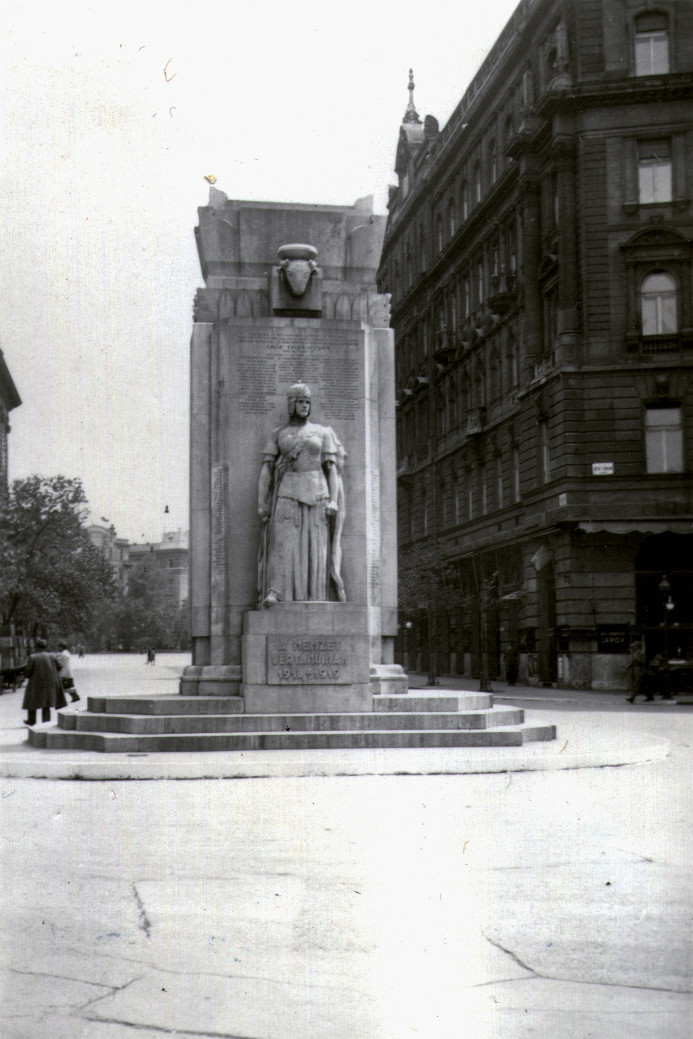 Budapest. Vértanúk tere, Nemzeti vértanúk emlékműve (Füredi Richárd, 1934.). Háttérben a Vécsey utca.